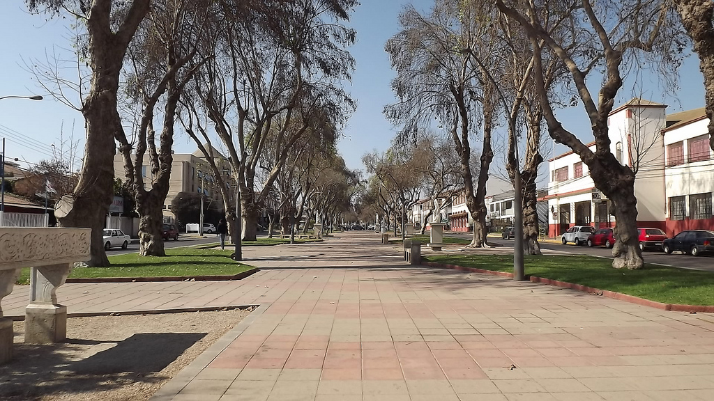 Avenida Francisco de Aguirre de La Serena